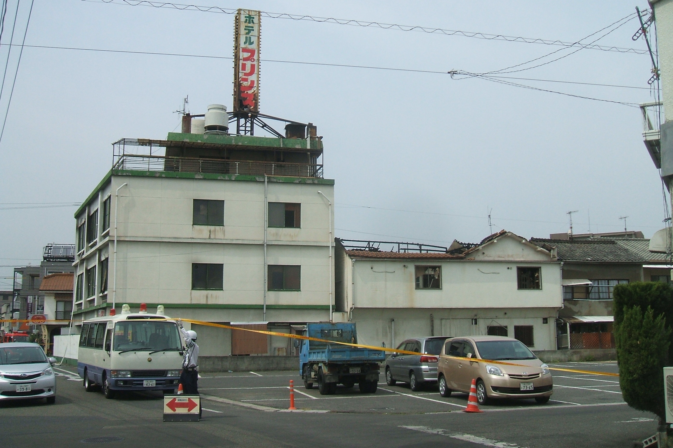 2012年5月13日に広島県福山市西桜町で発生したホテル火災現場を南側より撮影